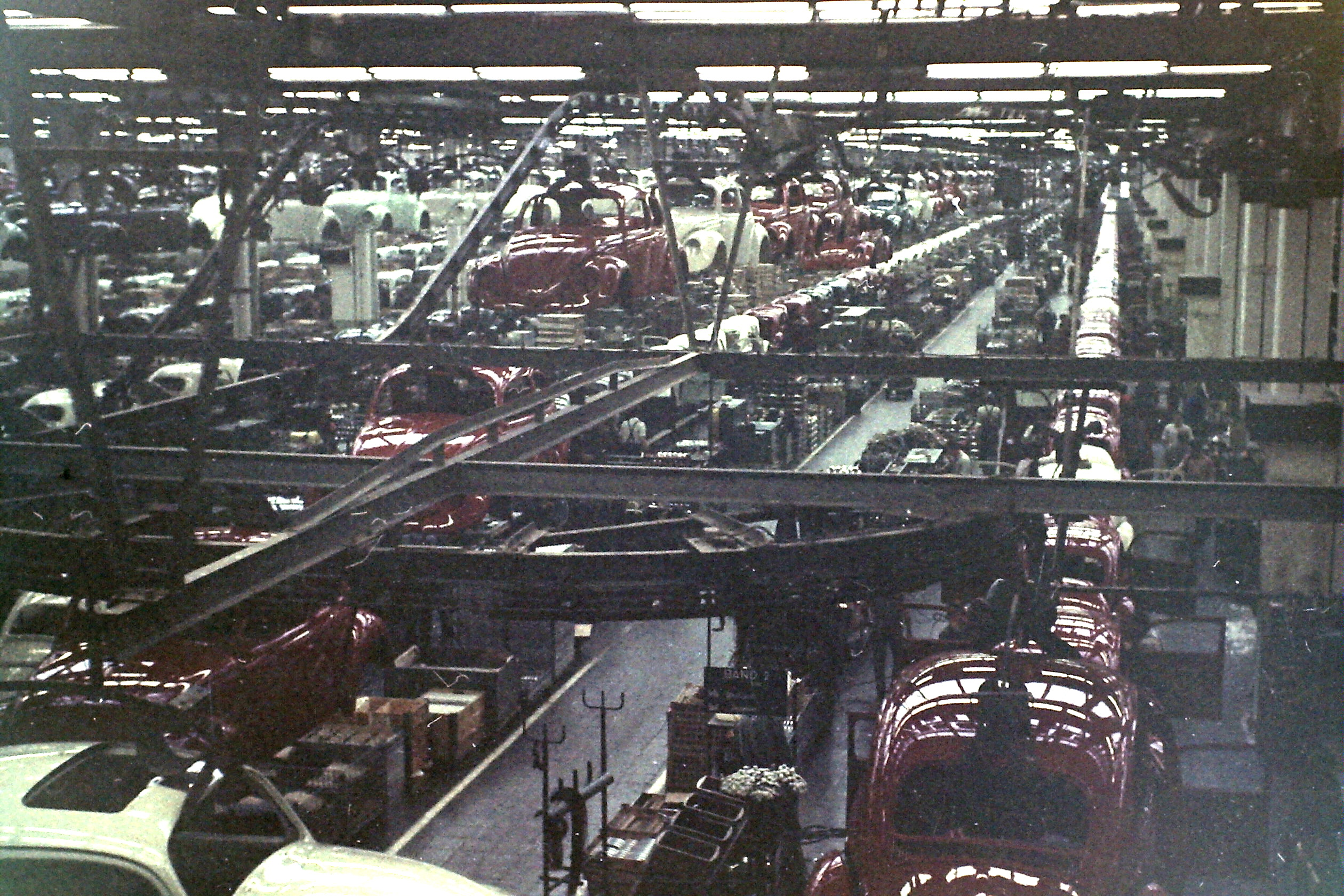 Fließbahndproduktion des VW Käfers in Wolfsburg